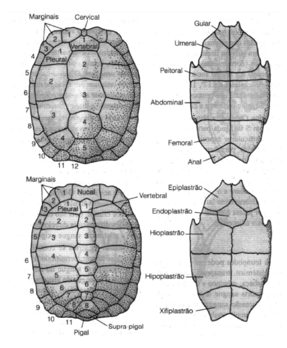 Casco de tartaruga